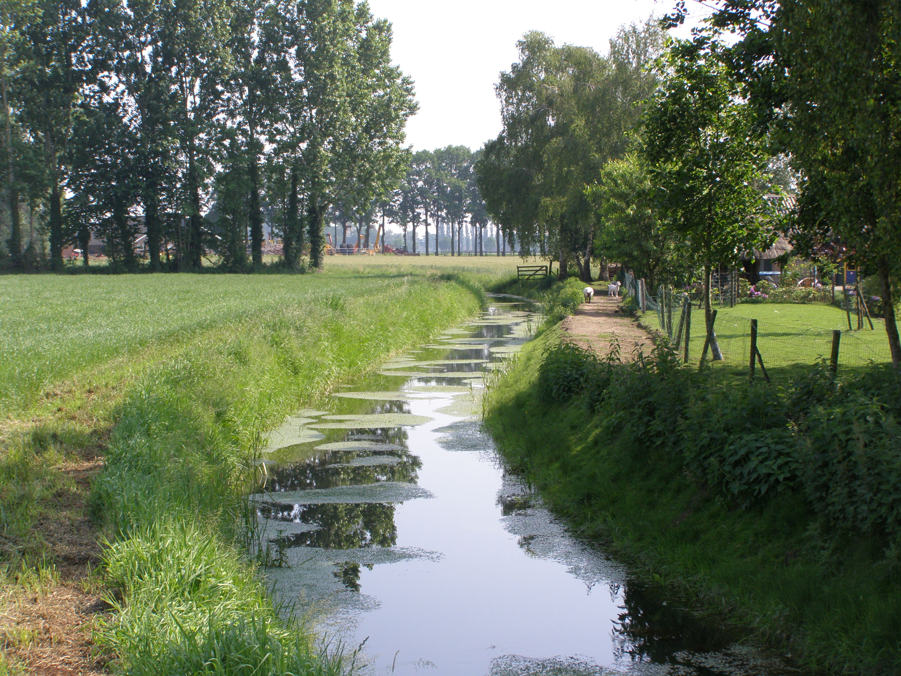 De Potlee is een watergang bij Goor in de Nederlandse provincie Overijssel. eigen werk.